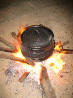 סיר ברזל - פויקה A cast iron potjie on a fire, very similar to a Dutch oven רישיון נוצר על ידי he:משתמש:אסף.צ